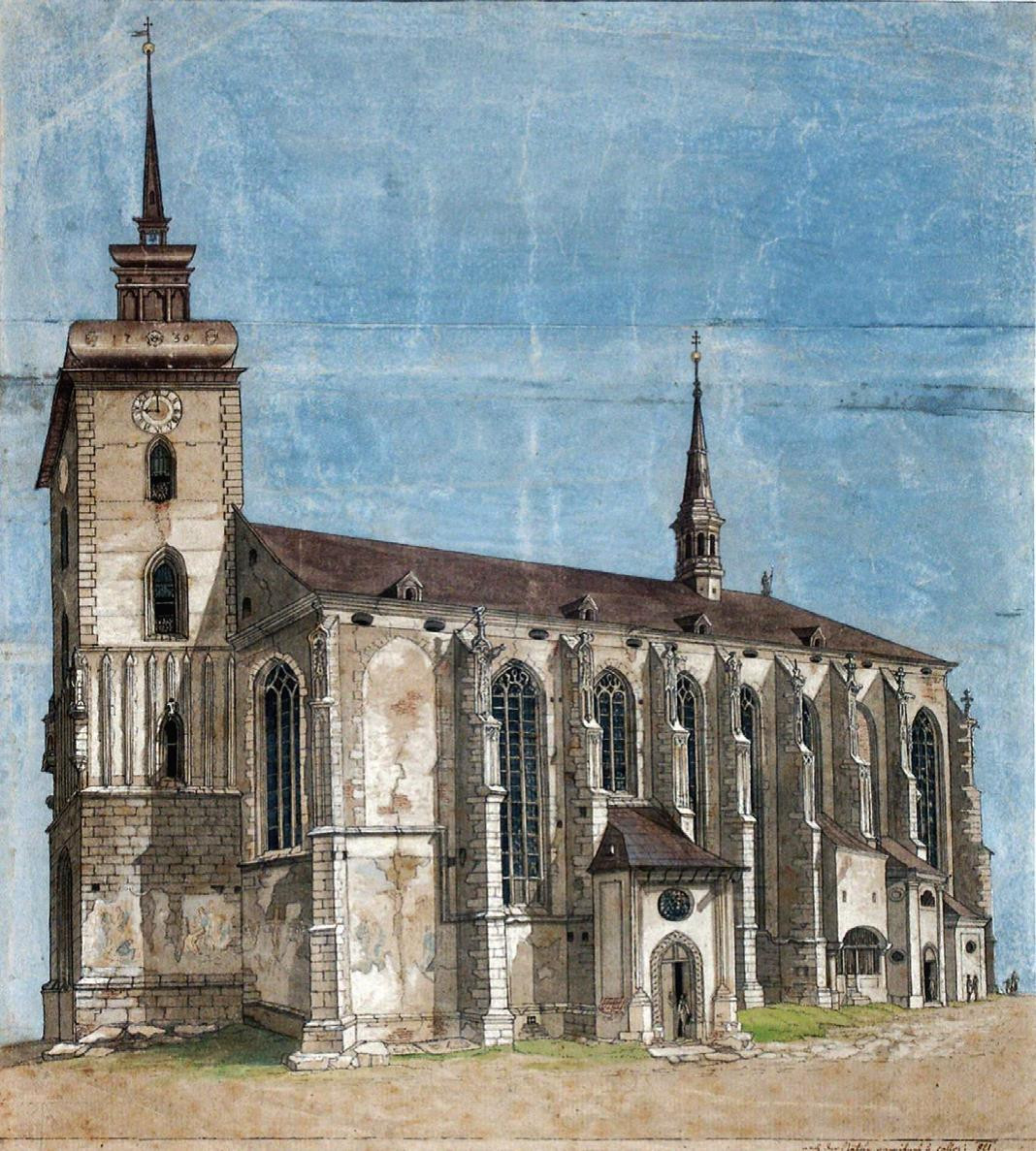 Jižní průčelí kostela sv. Jakuba